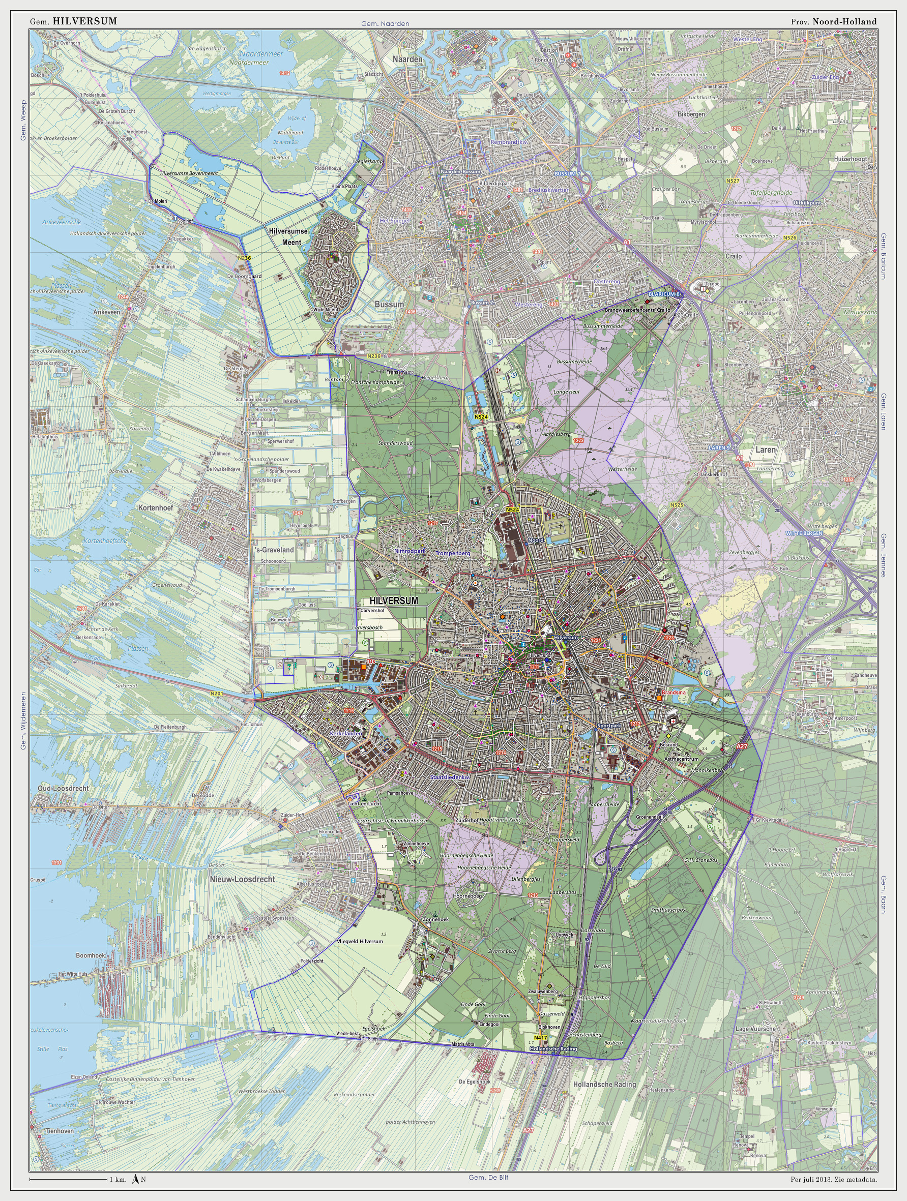 Topografische kaart van gemeente Hilversum (2013). Samengesteld door Jan-Willem van Aalst op basis van de GML open geodata van de BRT/Top10NL (basisregistratie Topografie, Kadaster 2011), vrijgegeven door Kadaster onder de Creative Commons BY licentie. Additionele gegevens uit BAG (8 juli 2013), uit de Open Street Map (9 juli 2013) en uit de Risicokaart. Peildatum kaartbeeld: 9 juli 2013. Zie ook Gemeentenatlas.nl Samenstelling en kleurenschema: Jan-Willem van Aalst, met QuantumGIS en Photoshop. Zie ook de Legenda.